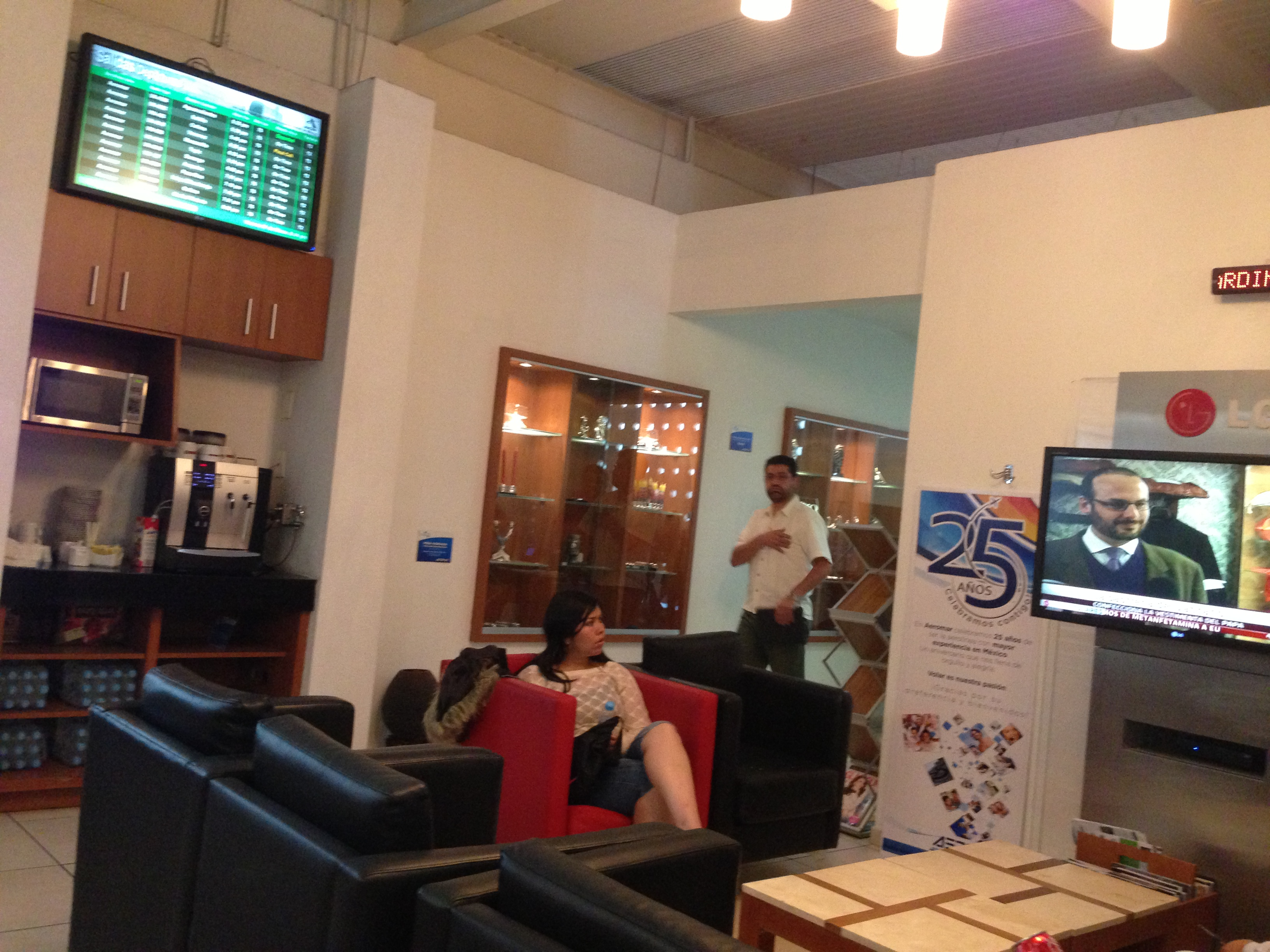 Salón Diamante de Aeromar en el AICM